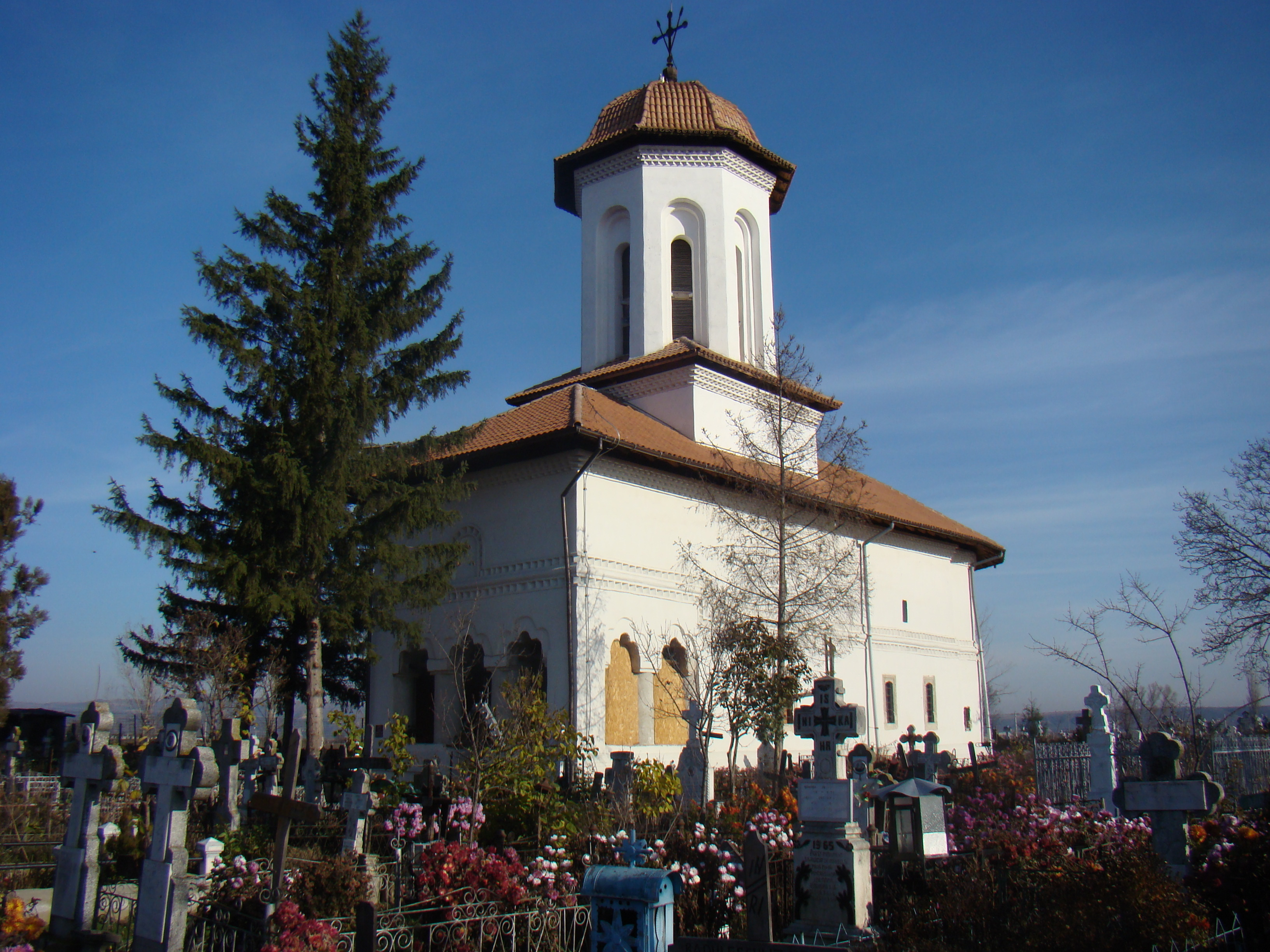 Biserica Buna Vestire Vernesti